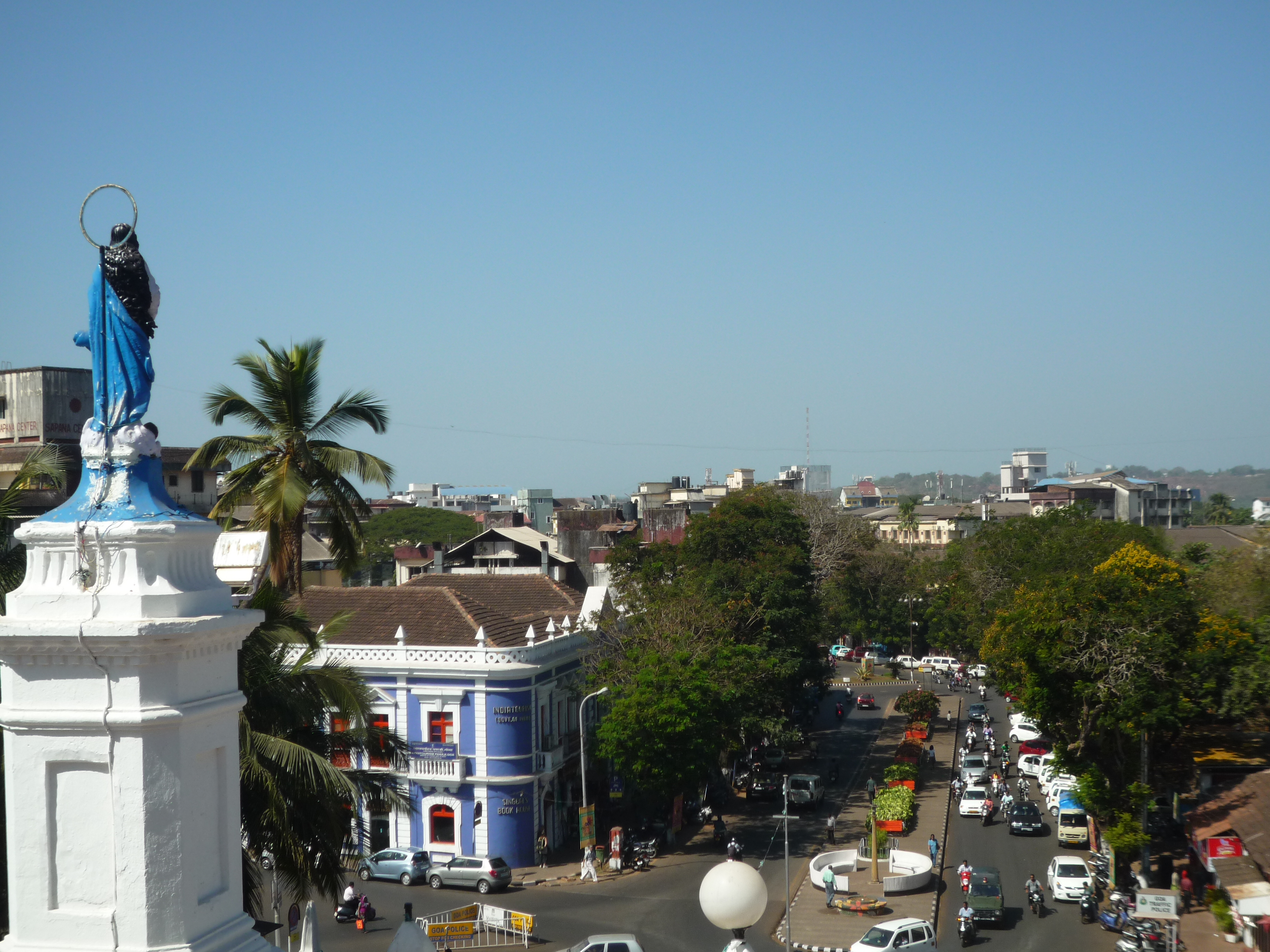 Панаджи